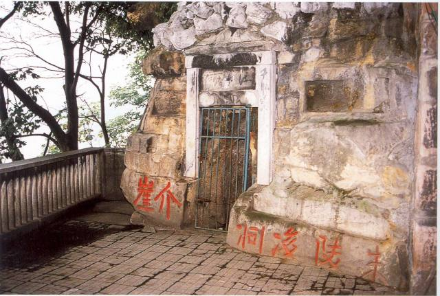 衡阳八景之一